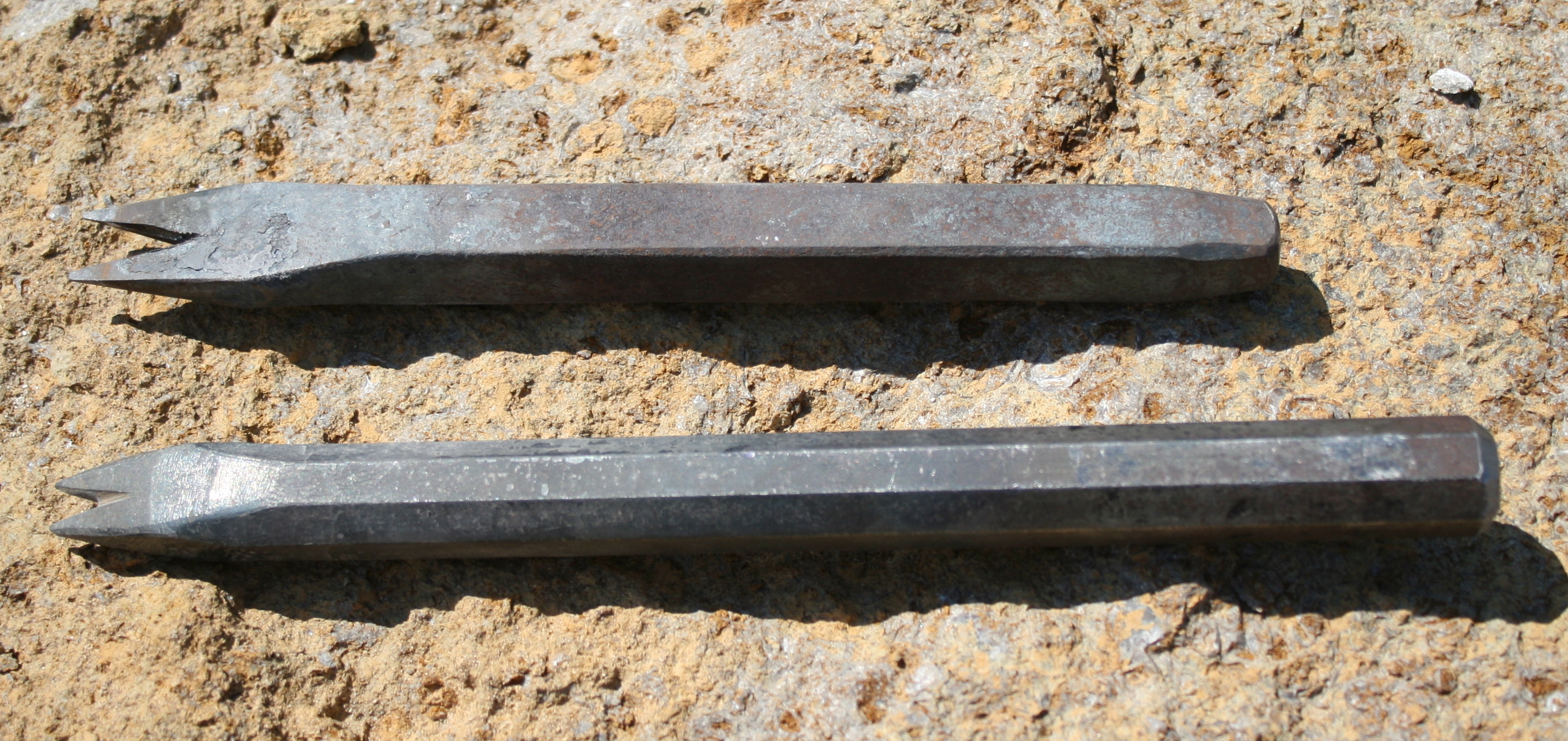 Hundezahn